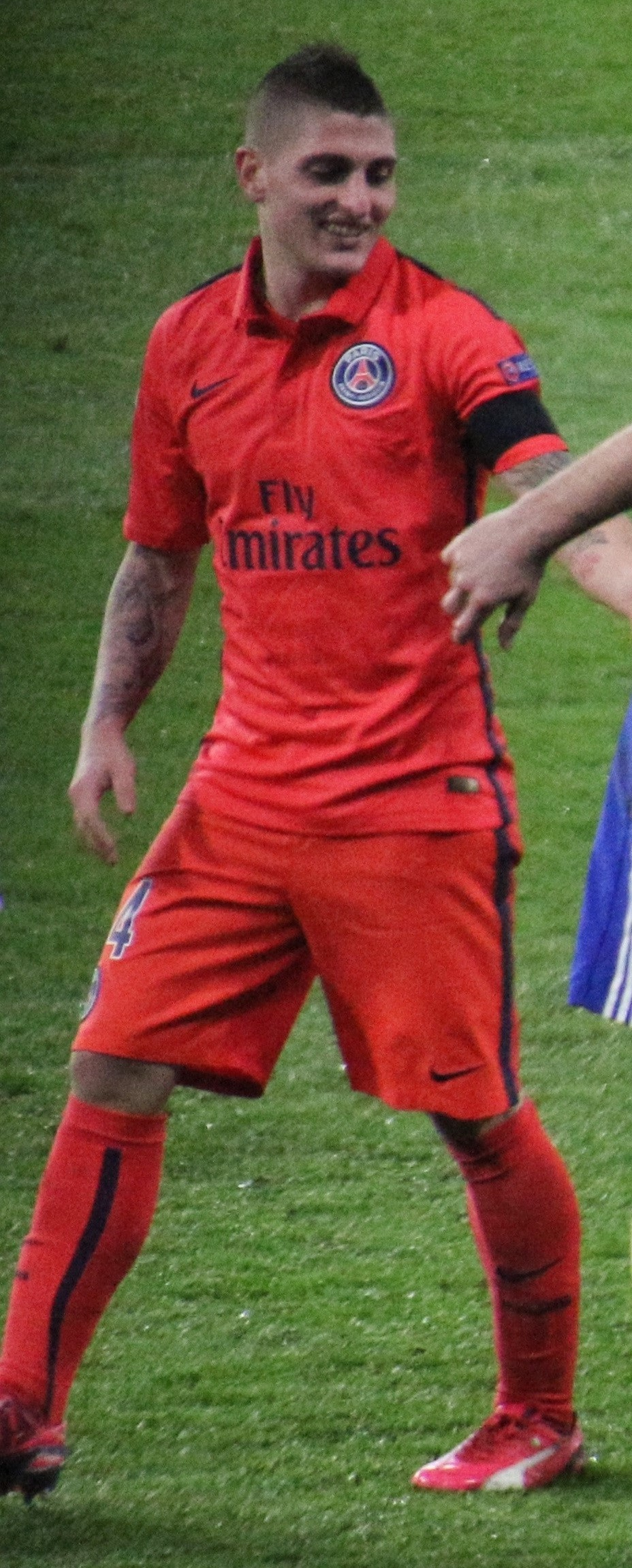 Marco Verratti con la maglia del PSG